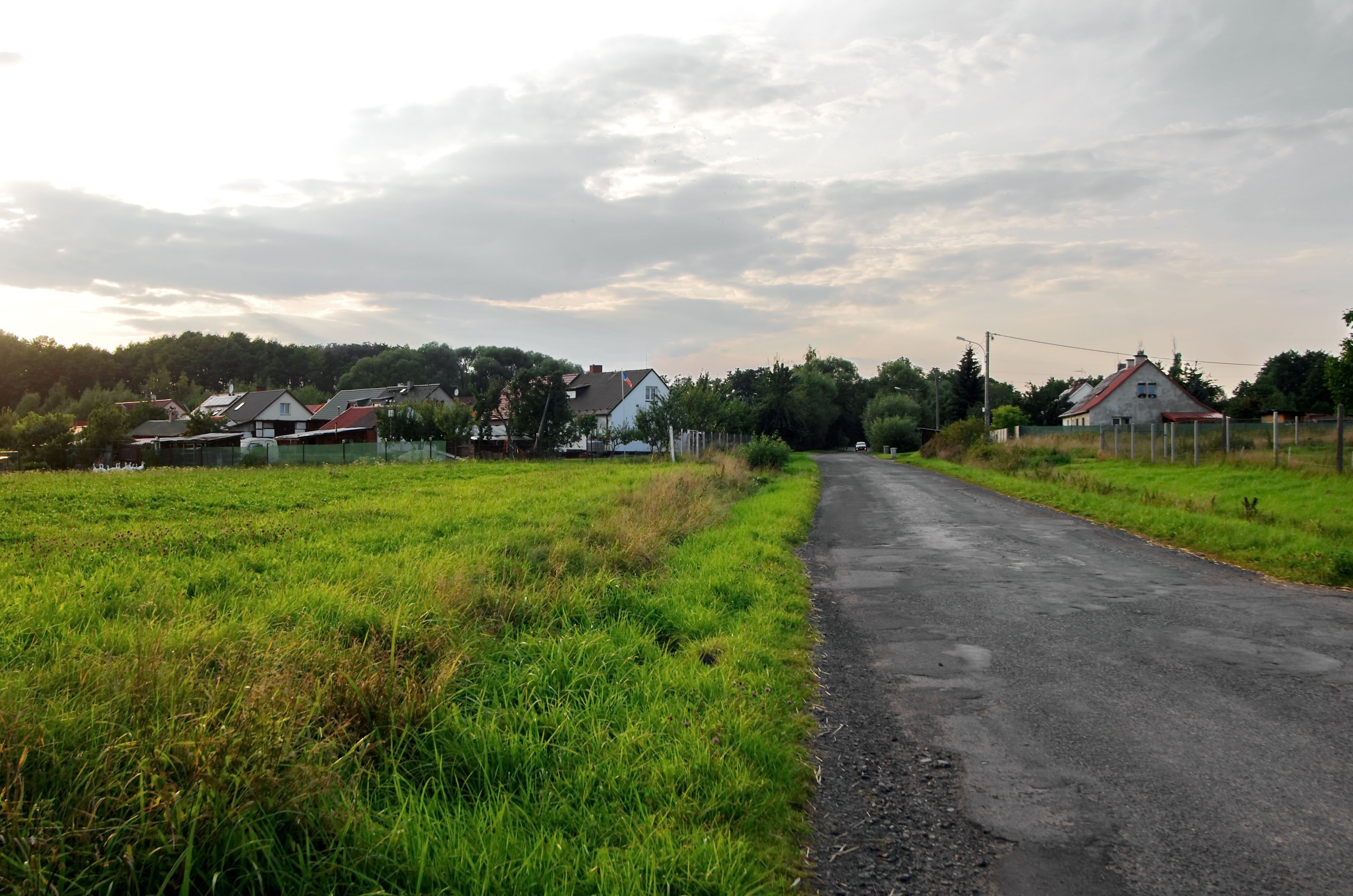 Osada Zlatá u Kynšperku nad Ohří, okres Sokolov